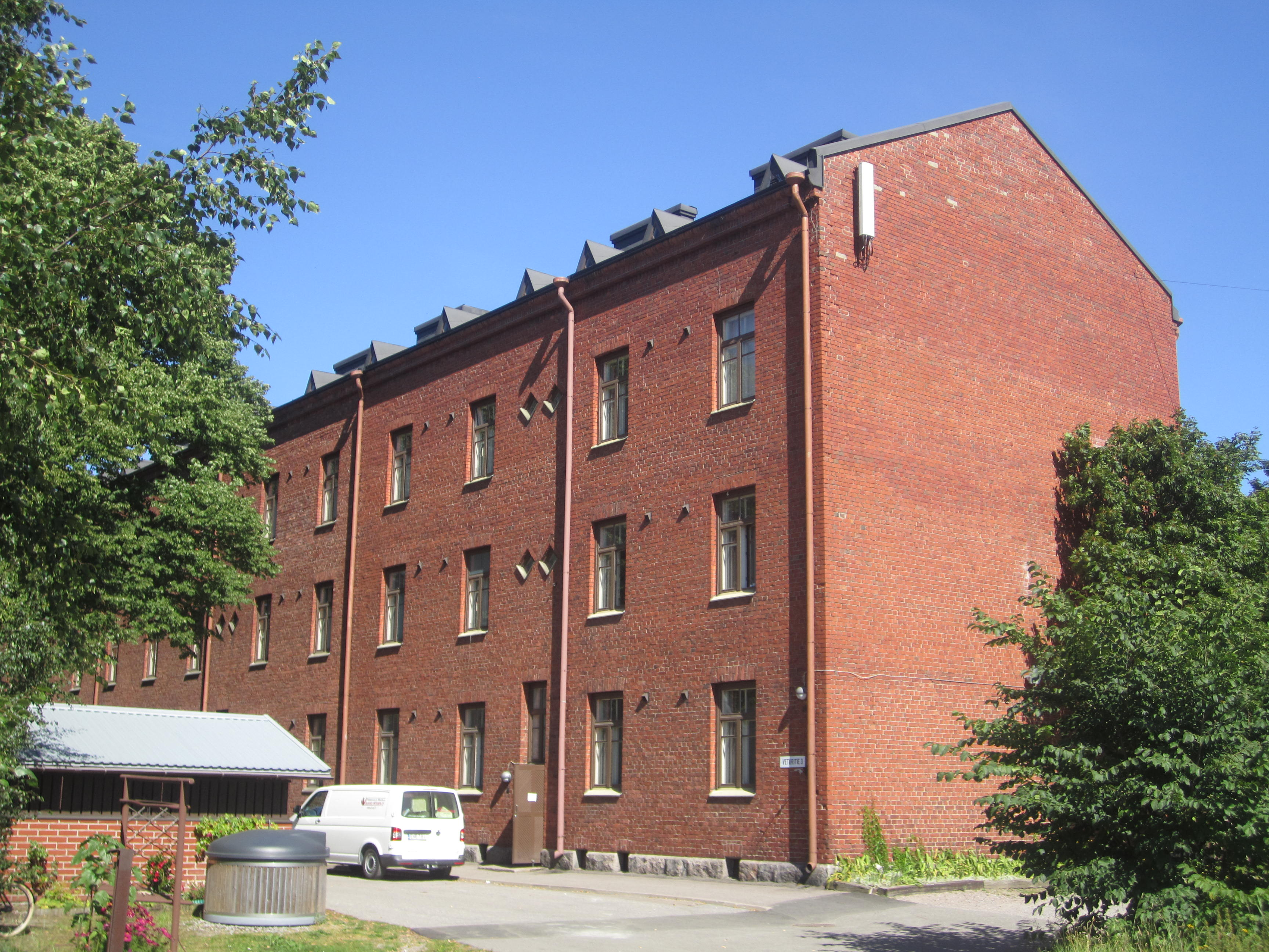 Toralinna-rakennus Helsingin Länsi-Pasilassa.